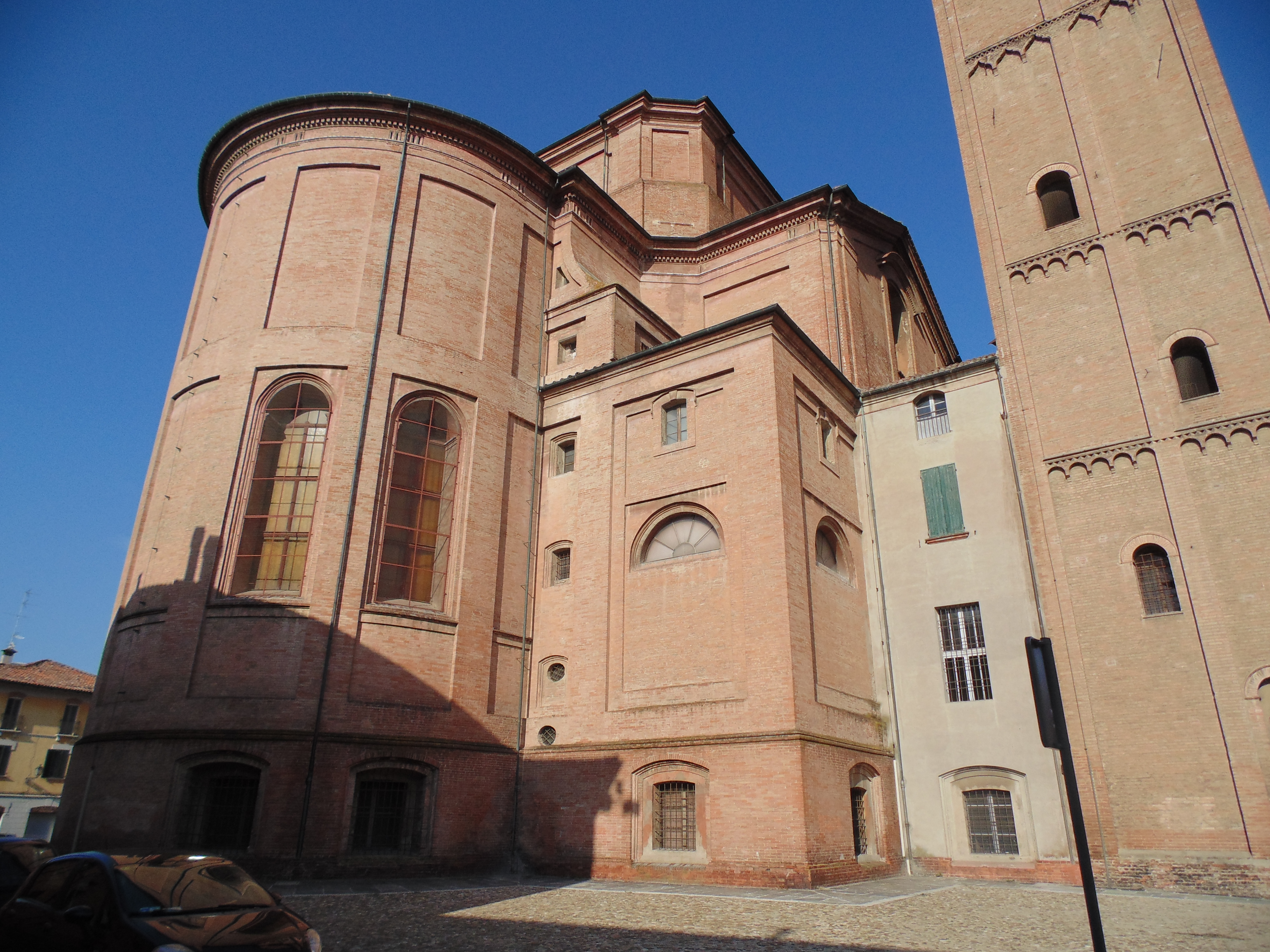 Chiesa cattedrale di San Cassiano - MIBAC This is a photo of a monument which is part of cultural heritage of Italy.